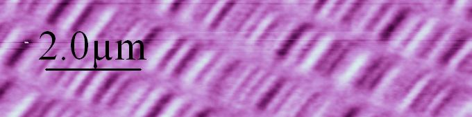 Magnetfeldmessung mittels AFM an einer 2 GByte SCSI Festplatte Die Striche stellen die magnetische Information von jeweils einem Bit auf einer Festplatte dar. verwendetes AFM: DI3100 im Magnetfeldmode erstellt an der Uni-Mainz, Inst. f. Physikalische Chemie (Bildrechte für Wikipedia - in sämtlichen internationalen Fassungen - erteilt, solange das Bild weiterhin frei verfügbar bleibt. Die Weitergabe von Bildrechten wird nicht gestattet.)